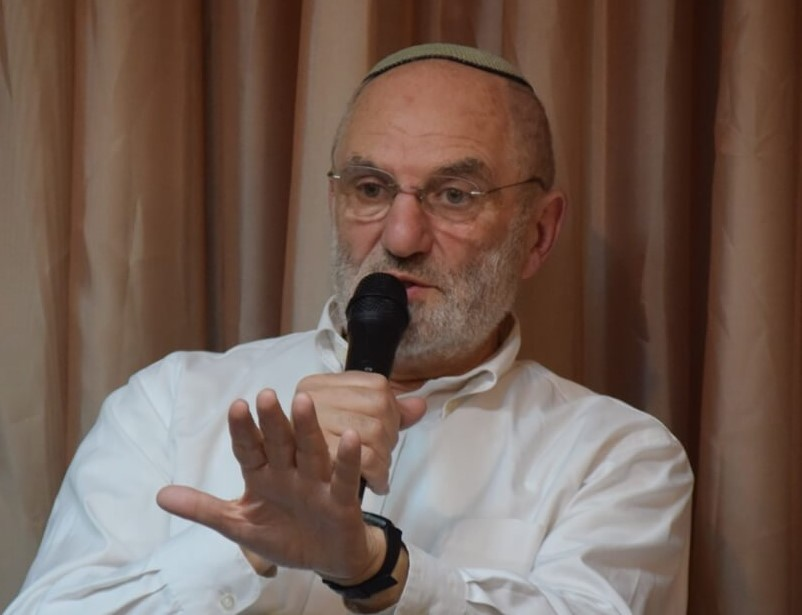 Фотография Якова Мироновича Рабкина на публичной дискуссии в Киеве.